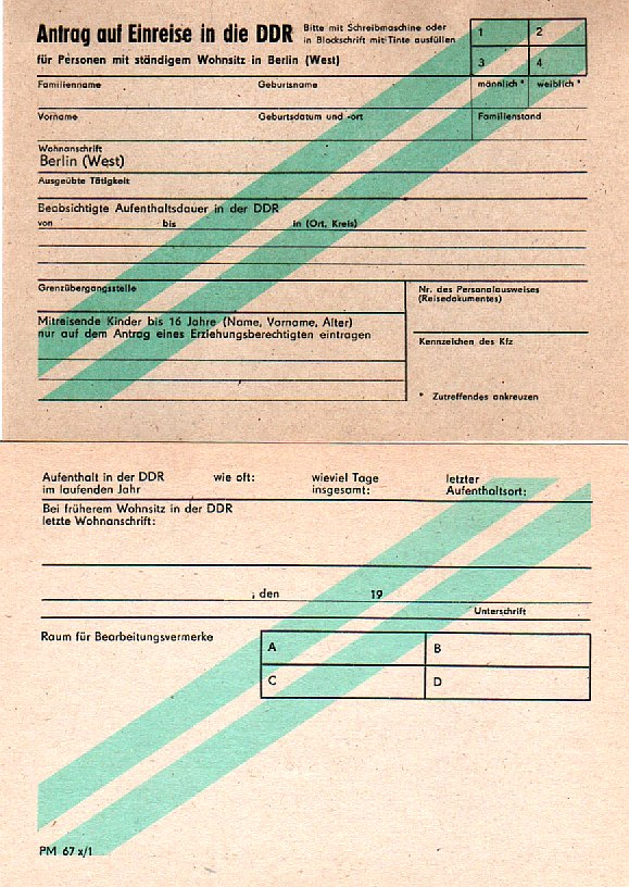 Antragsformular für die Einreise mit Tagesvisum für West-Berliner